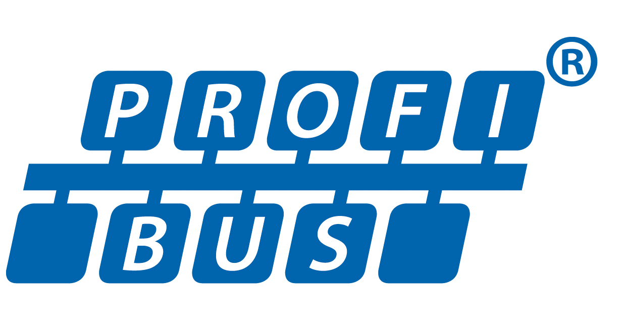 Profibus-Logo ab 2010